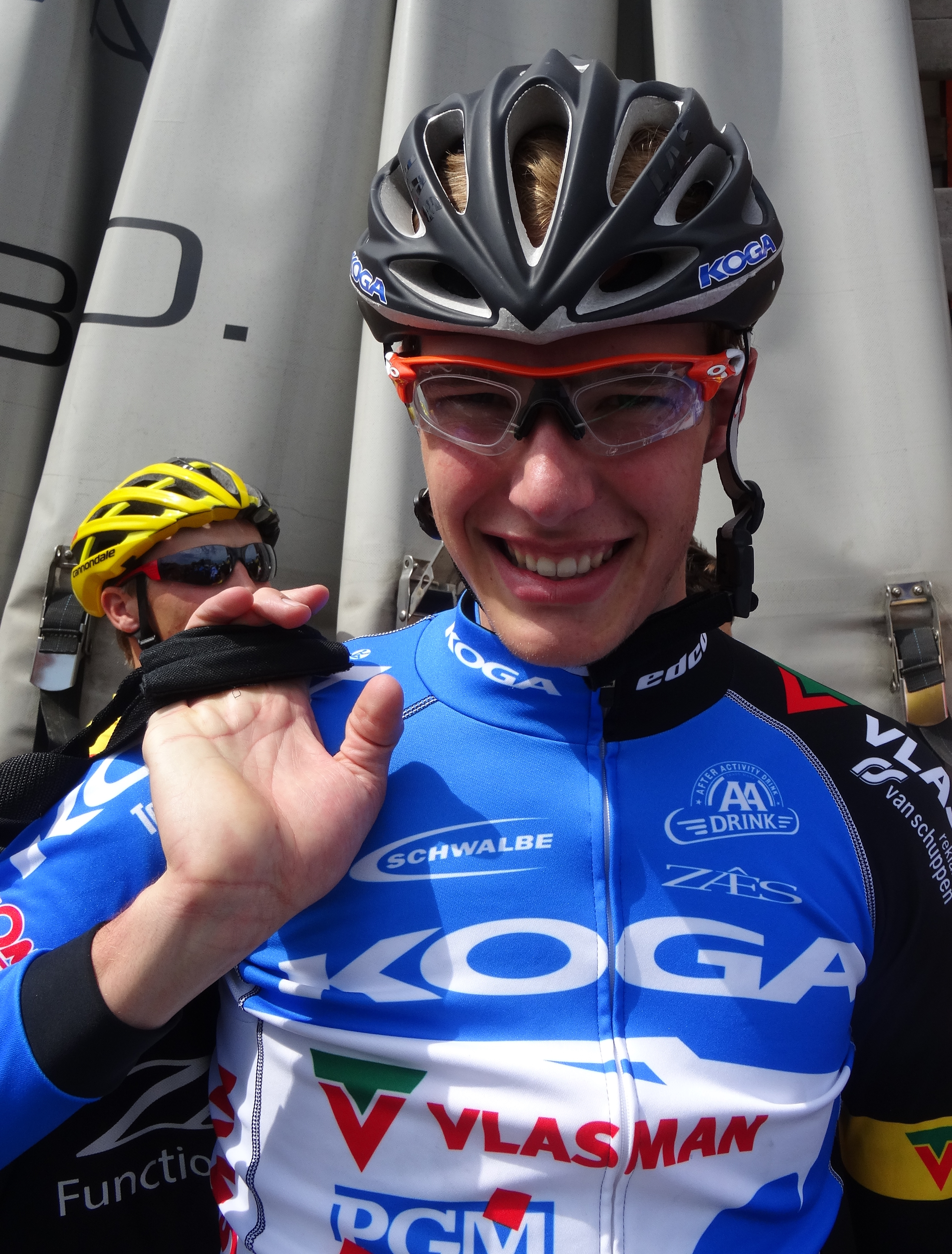 Reportage réalisé le dimanche 8 juin à l'occasion du départ du Mémorial Philippe Van Coningsloo 2014 à Wavre, Belgique.